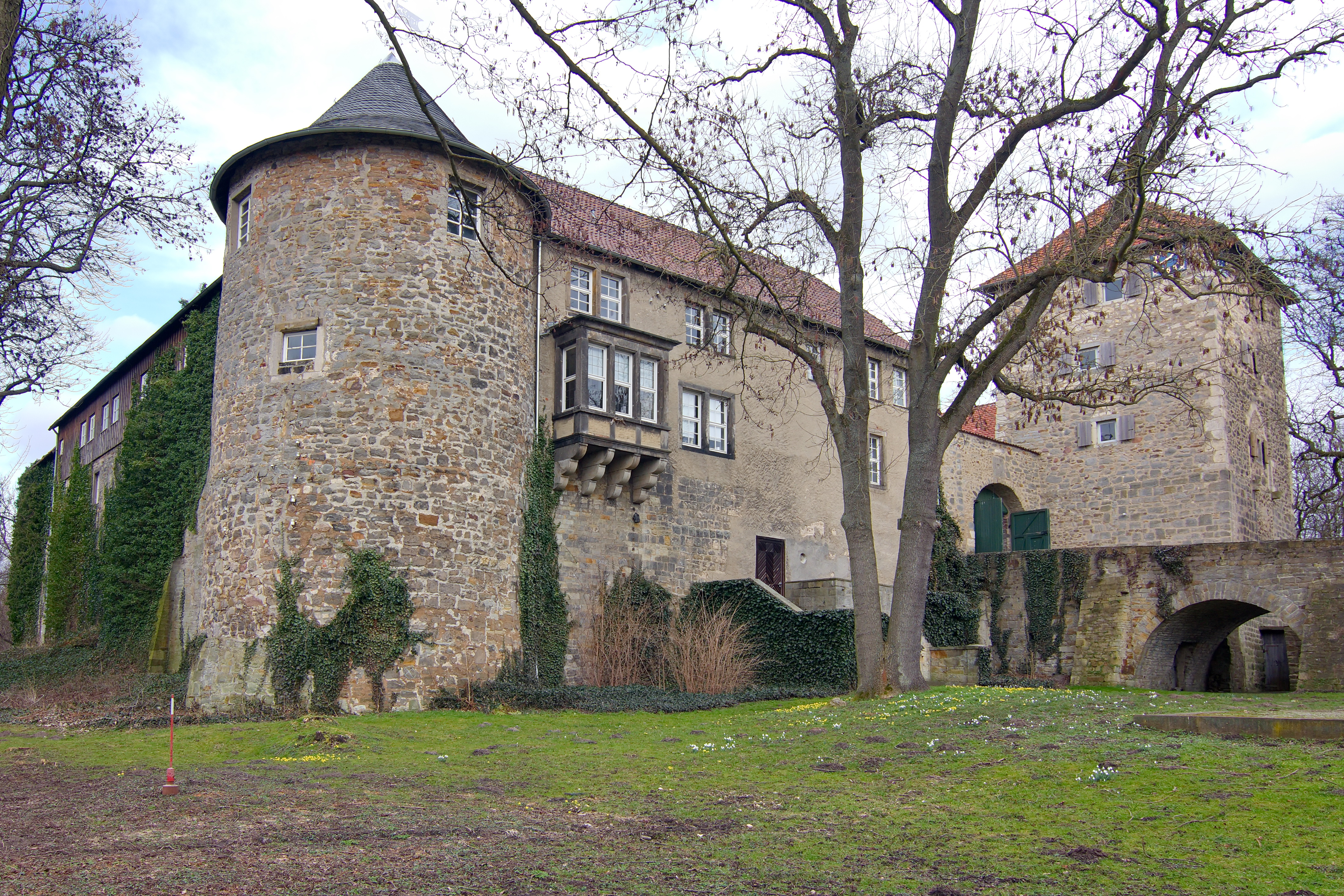 Burg Neuhaus ist eine gut erhaltene, mittelalterliche Wasserburg im Wolfsburger Stadtteil Neuhaus und wurde 1371 erstmals erwähnt.